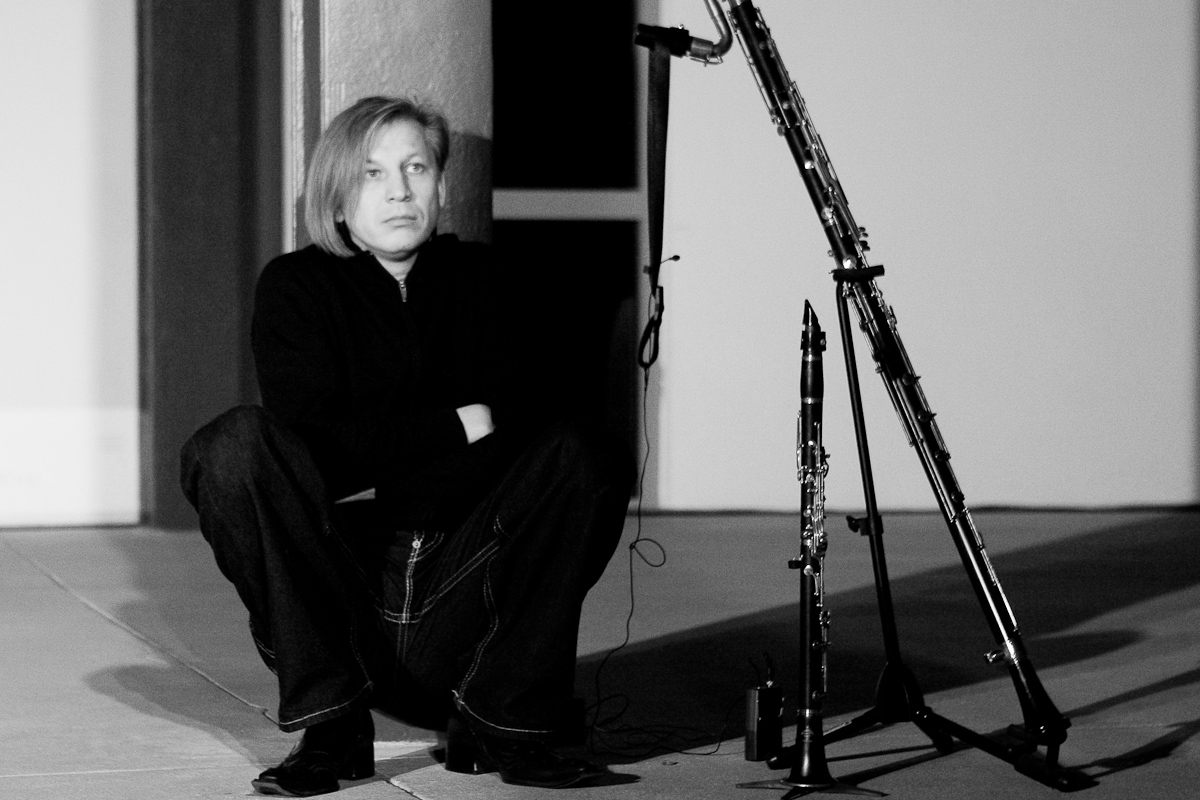 Этот снимок сделан в Германии в г. Брауншвейг. Влад Быстров и кларнет.